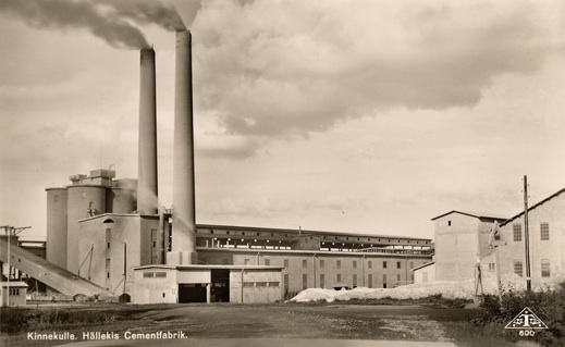 Cementfabriken, Hällekis. Nedlagd 1978/79